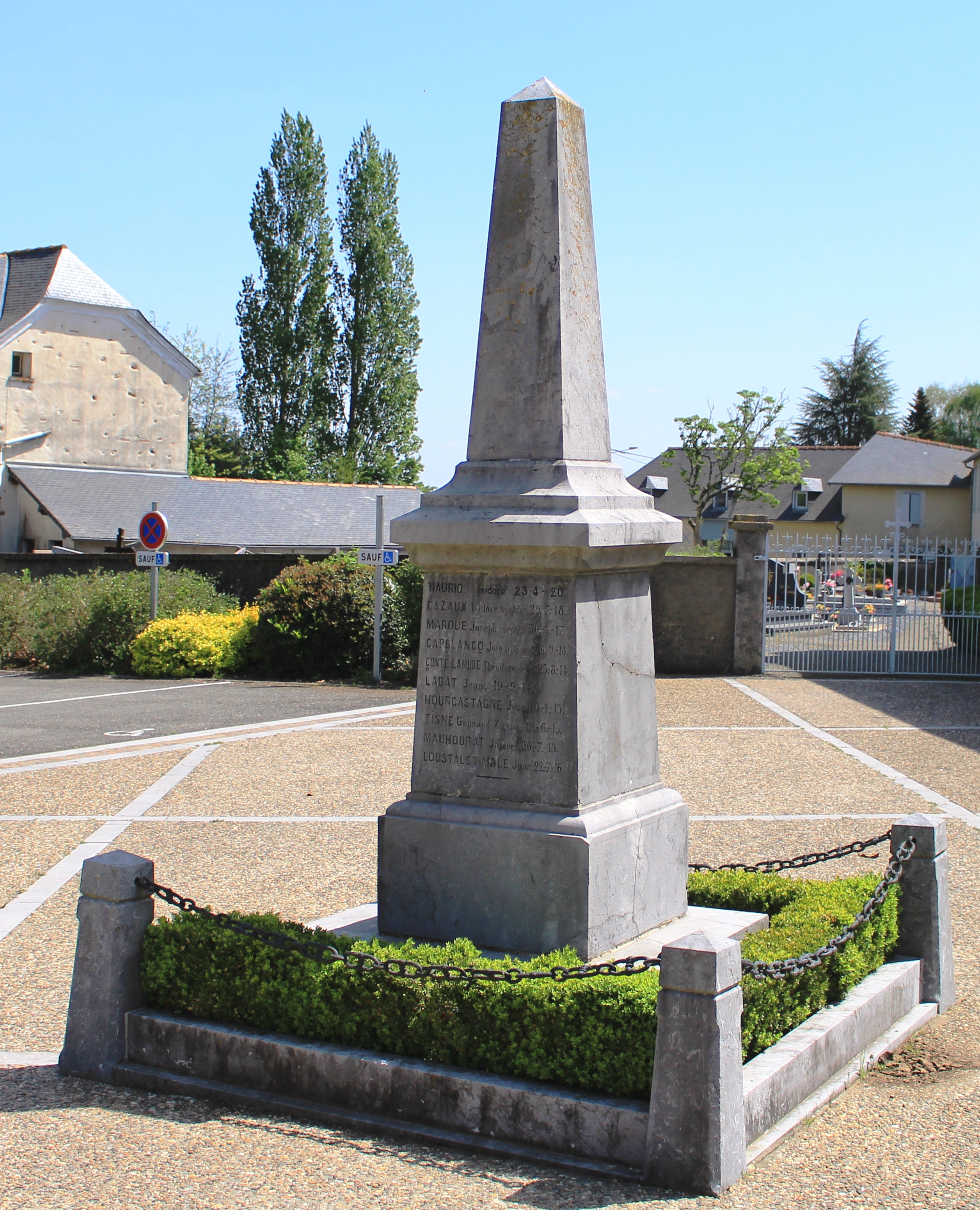 Monument aux morts de Gardères (Hautes-Pyrénées)